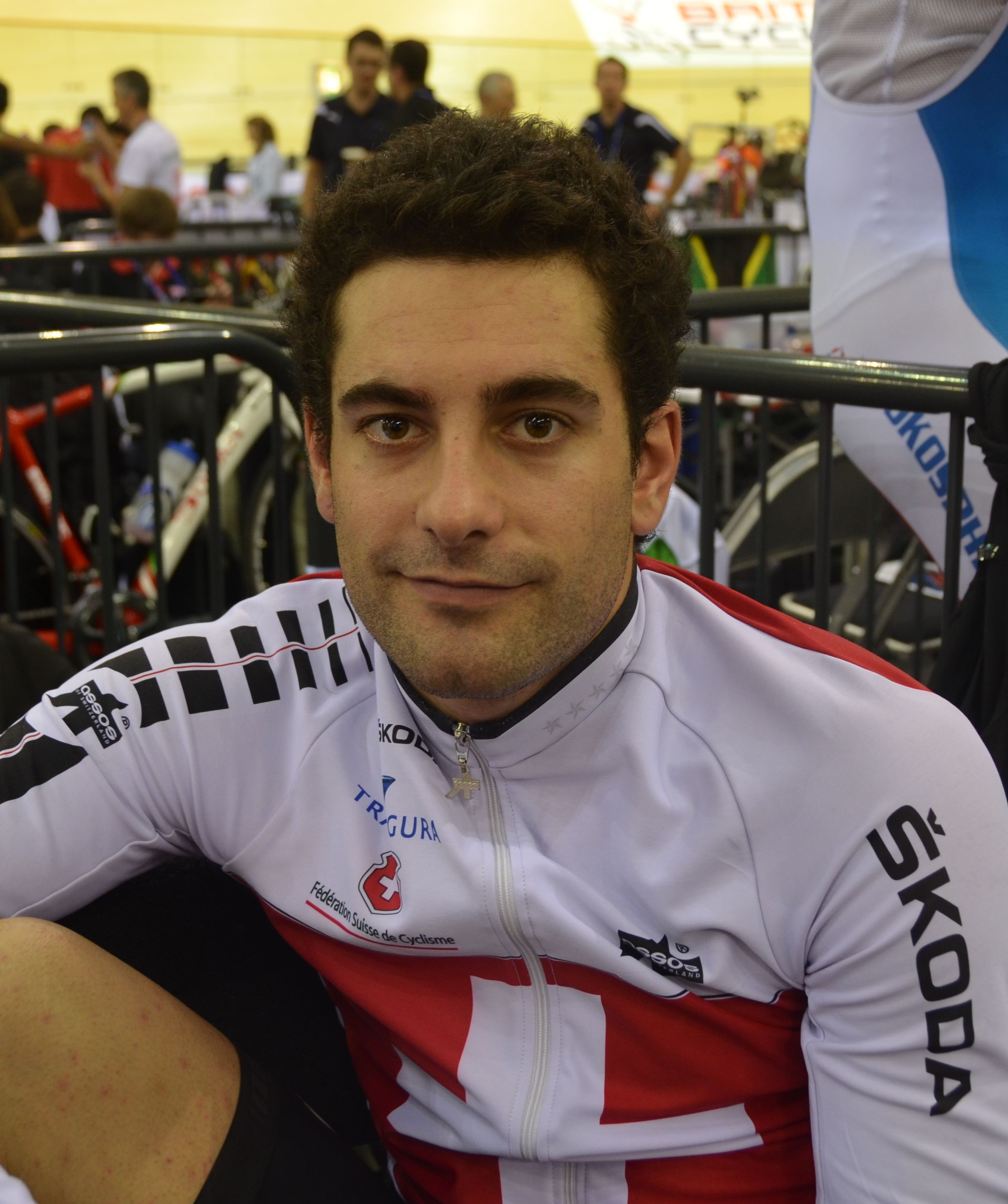 Tristan Marguet, Schweizer Radsportler